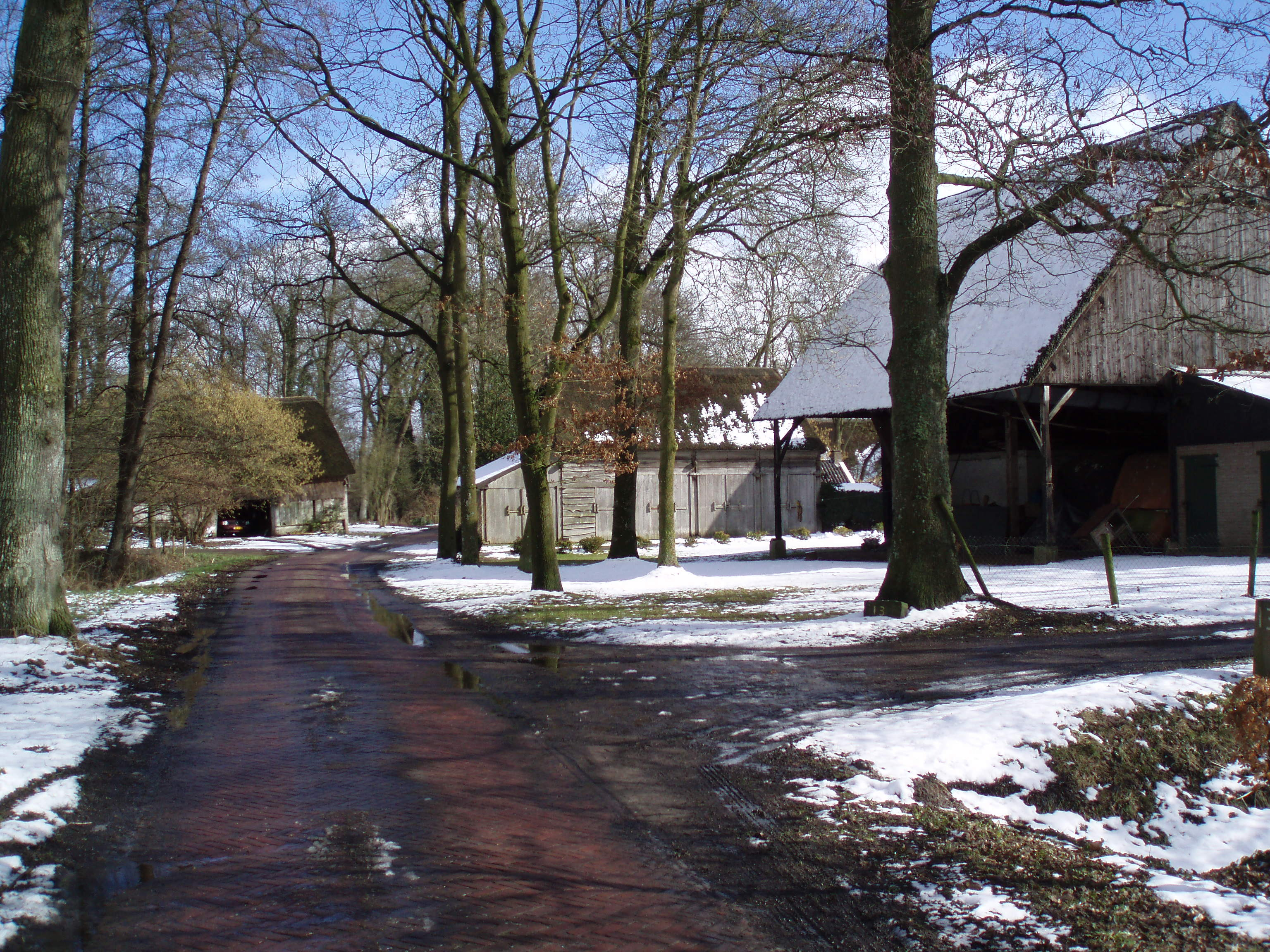 Westerse Bos in de winter